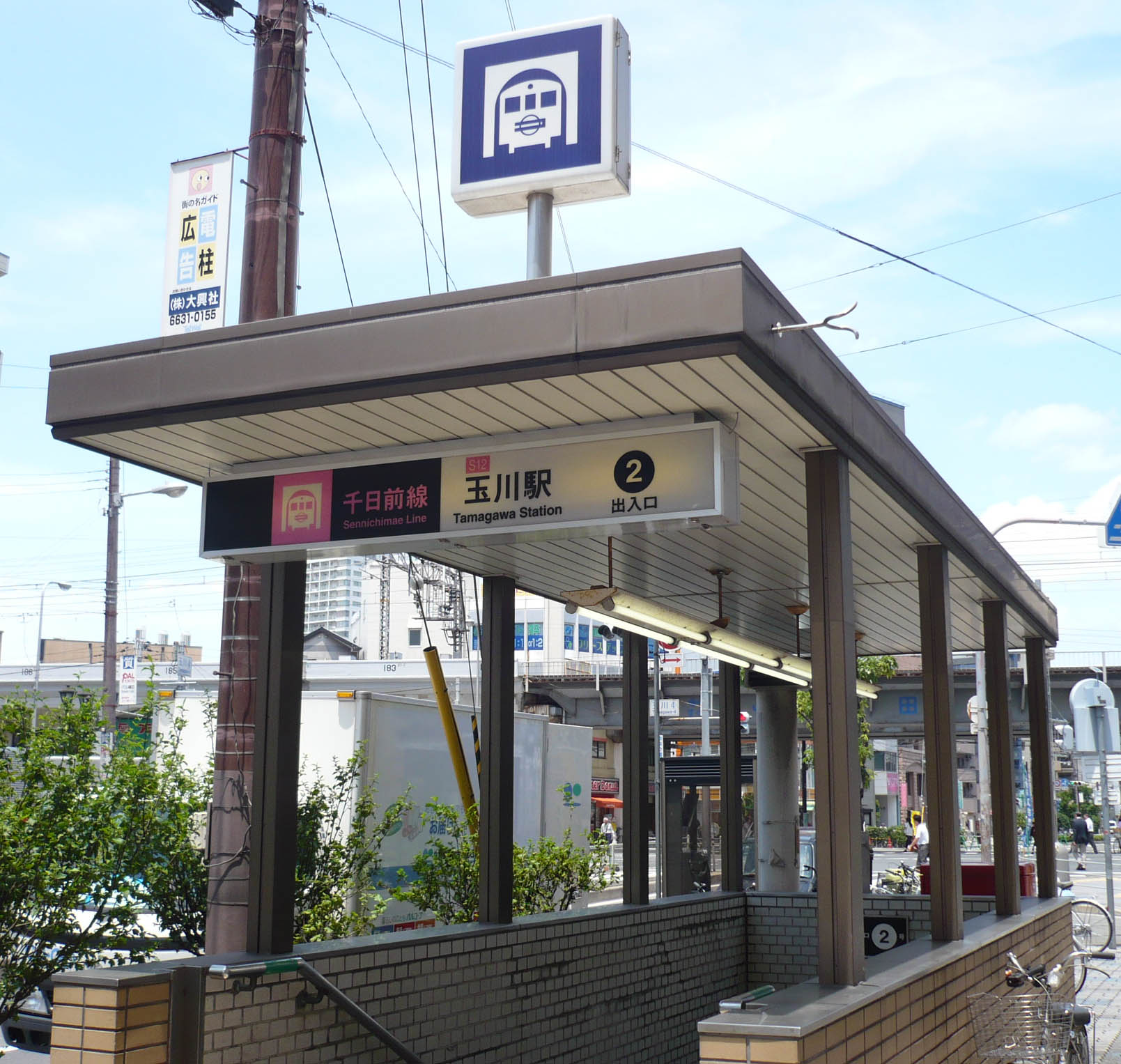 千日前線 玉川駅 2番出口